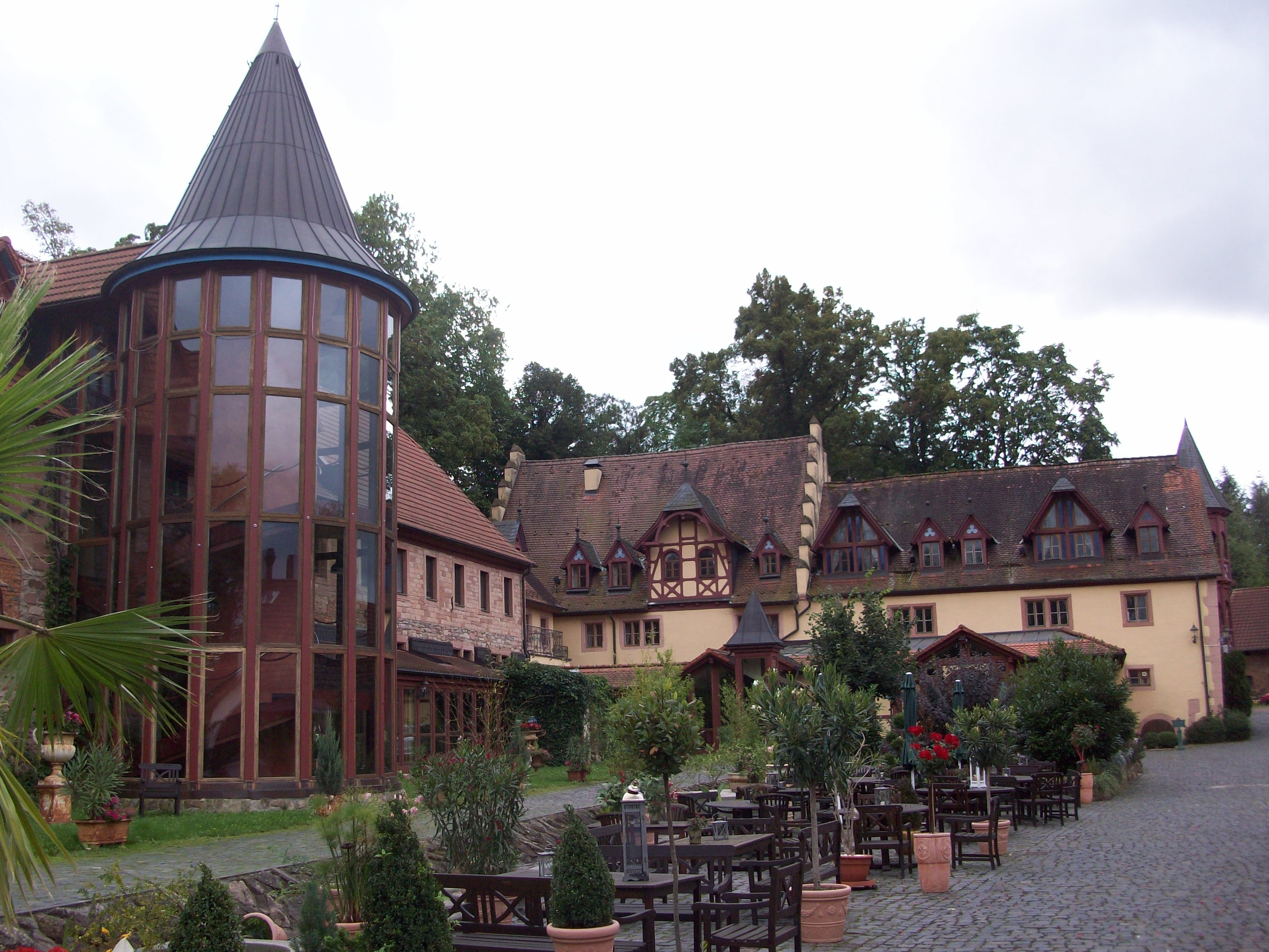 Schloss Weyberhöfe: verglaster Treppenturm im Osten und südlicher Querriegel